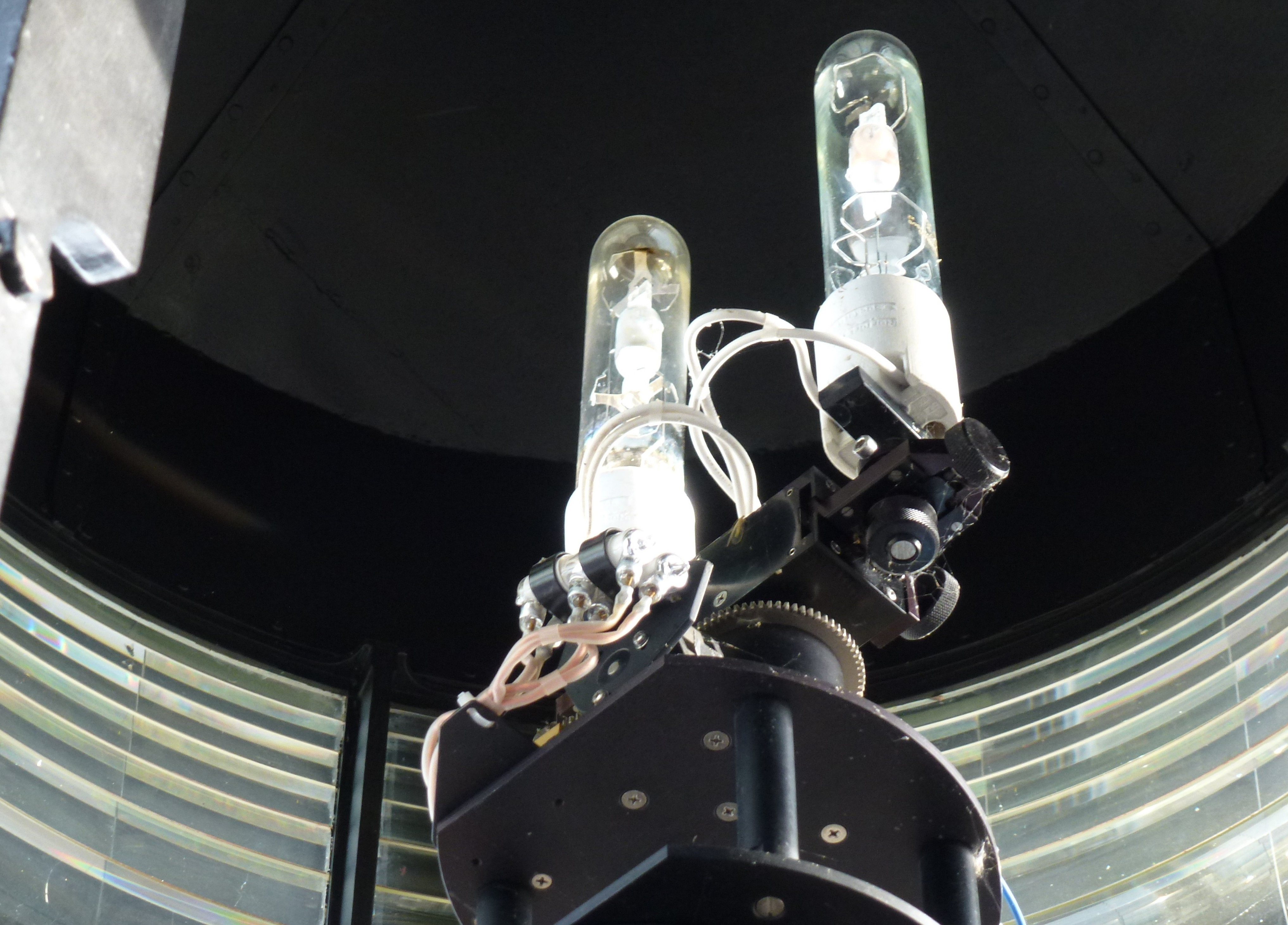 Leuchtturm Dahmeshöved, Lampen